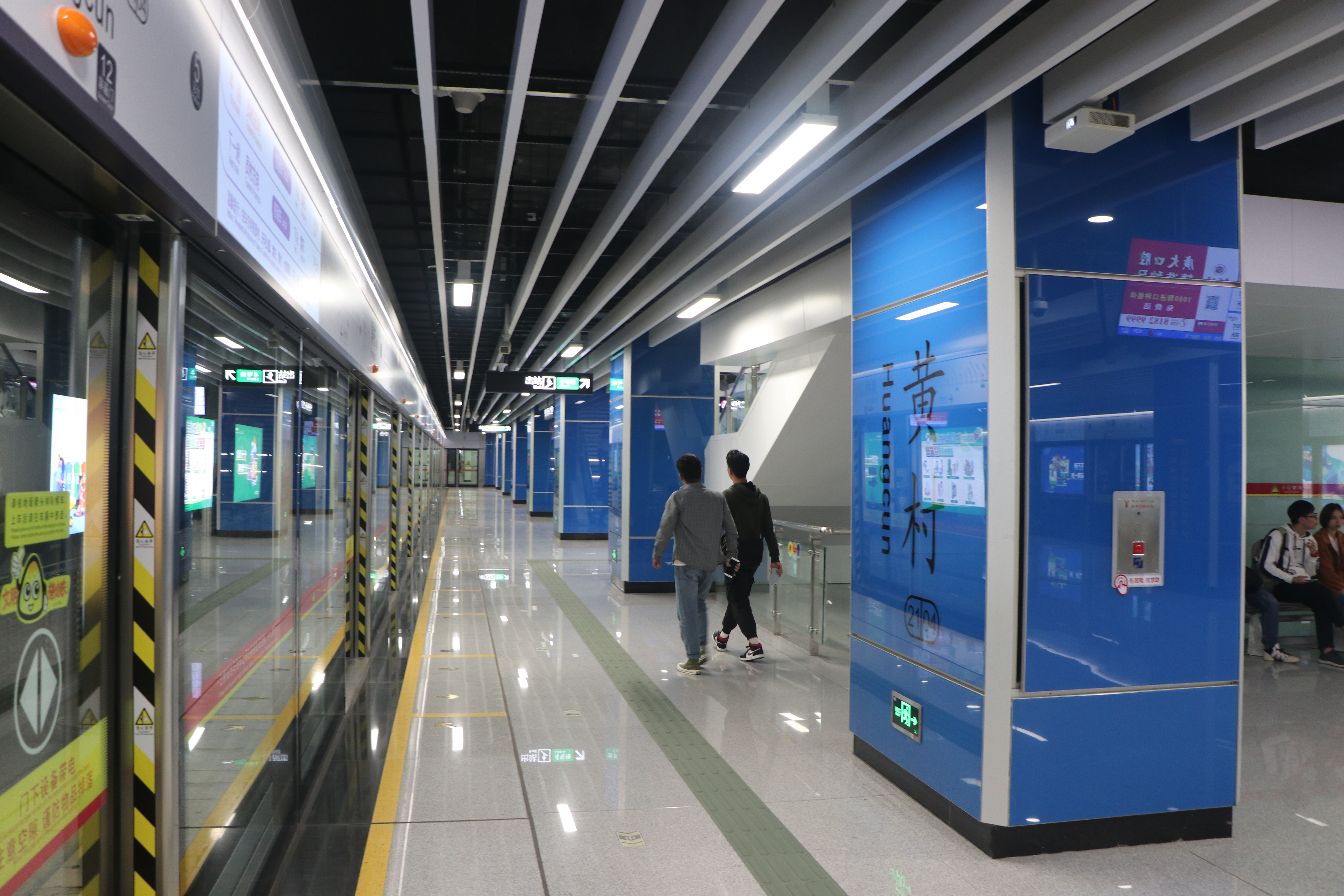 广州地铁黄村站